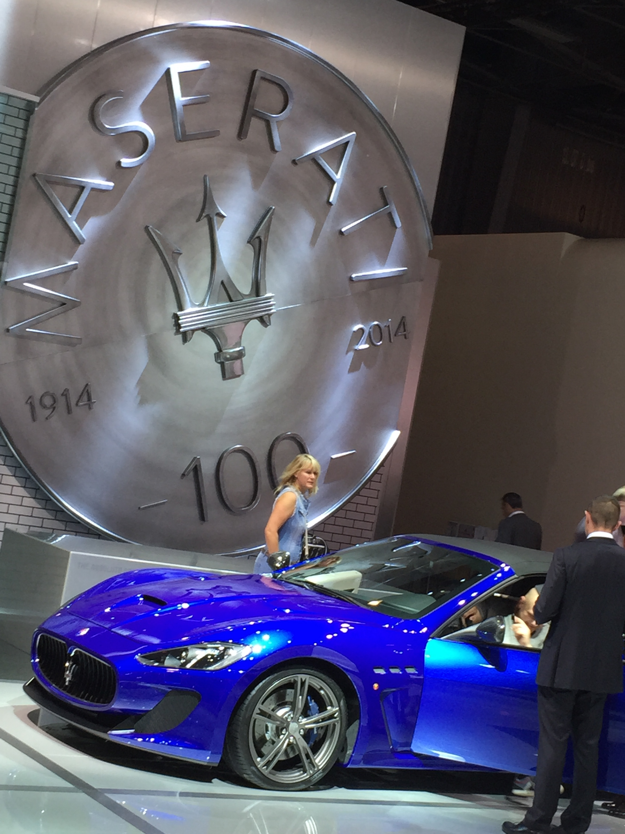 Maserati au Mondial de l’Automobile de Paris 2014